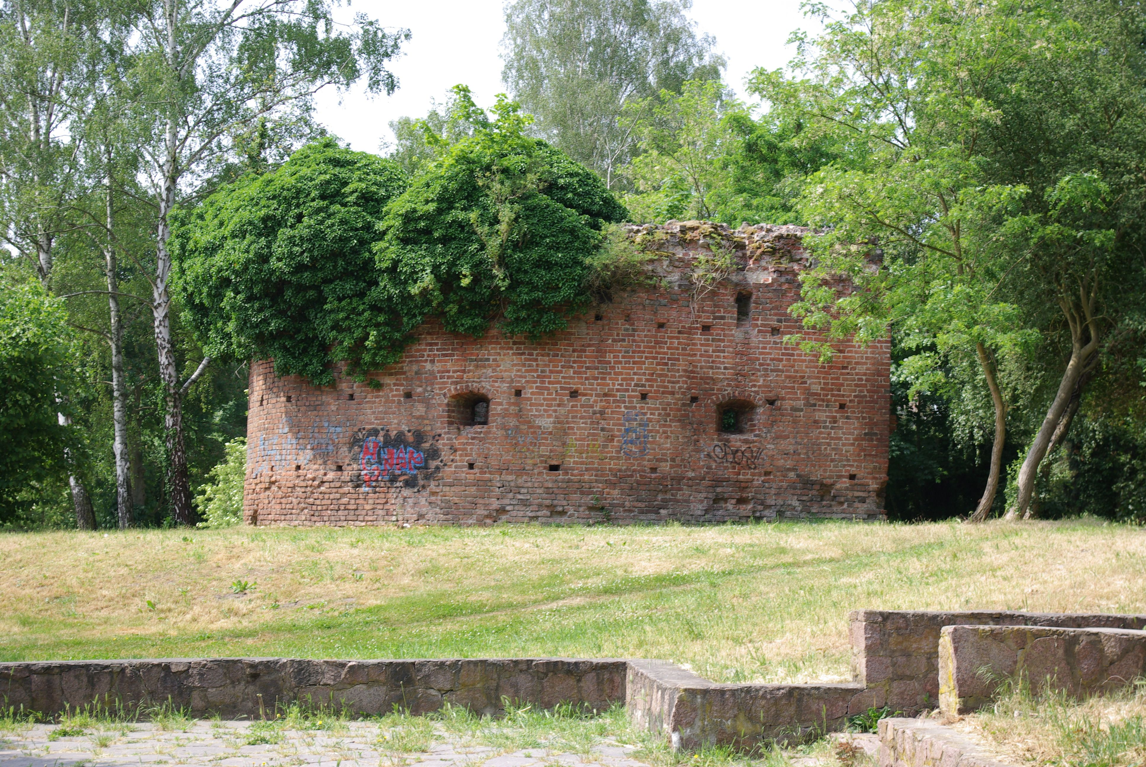 Zossen, Brandenburg, die Bastionsruine im Stadtpark, die Ruine steht unter Denkmalschutz